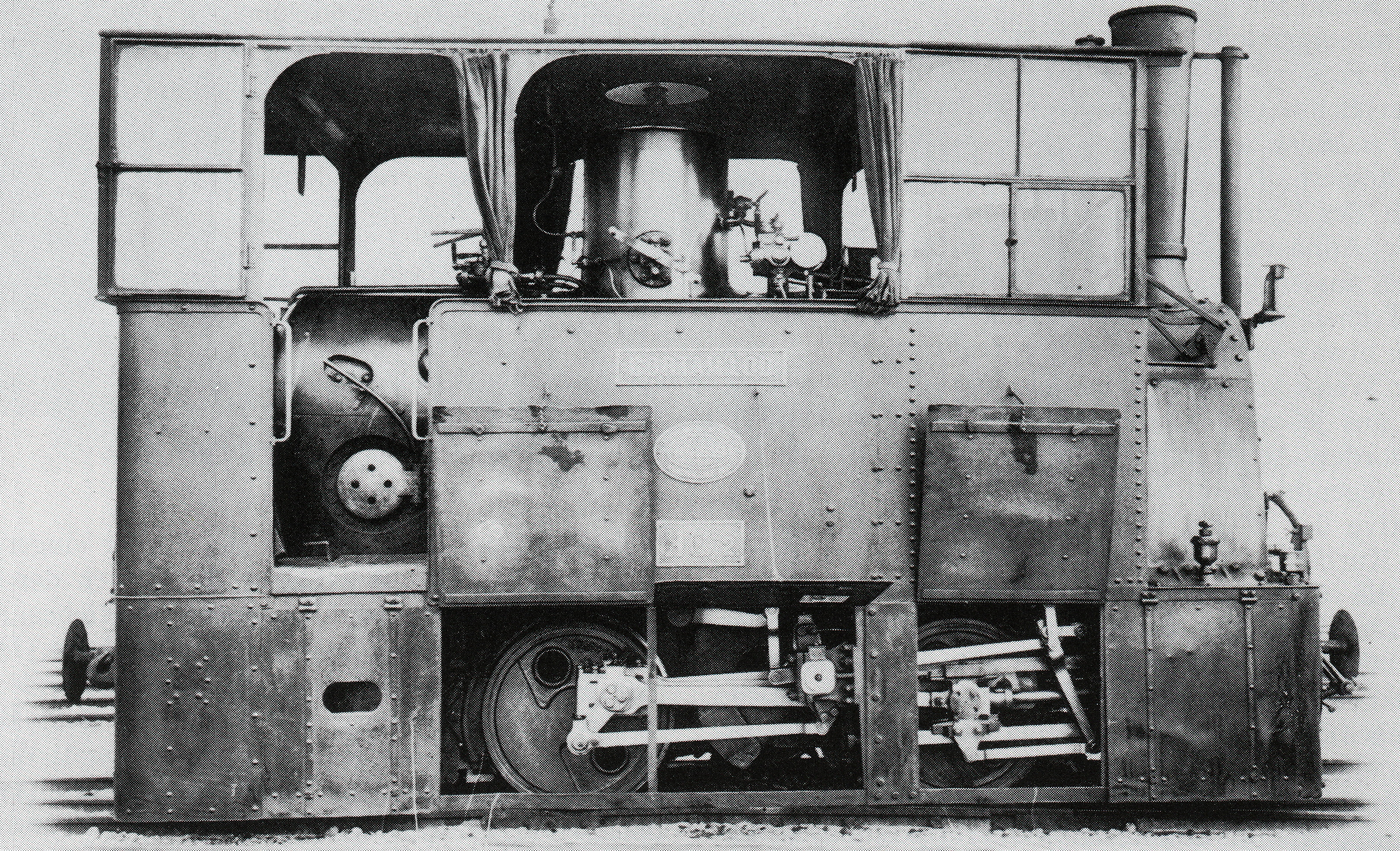 Zahnradlocomotive (Syſtem Riggenbach) HG 2/2 Nr. 2 Cortaillod der Neuenburg—Cortaillod—Boudry-Bahn, gebaut 1892 von Krauß & Cie. zů München (Fabr.-Nr. 2619), 1903 an Daſoul zů Brüſſel verkauft, Abbruchjahr unbekannt.